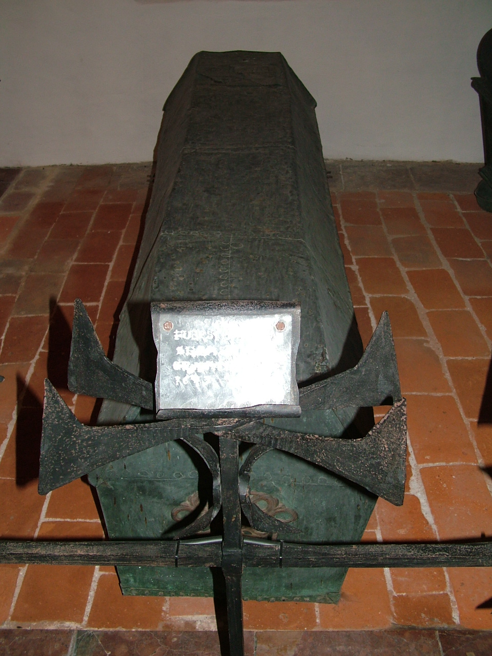 Grab Fürstbischof Pötting in der Bischofsgruft des Passauer Doms